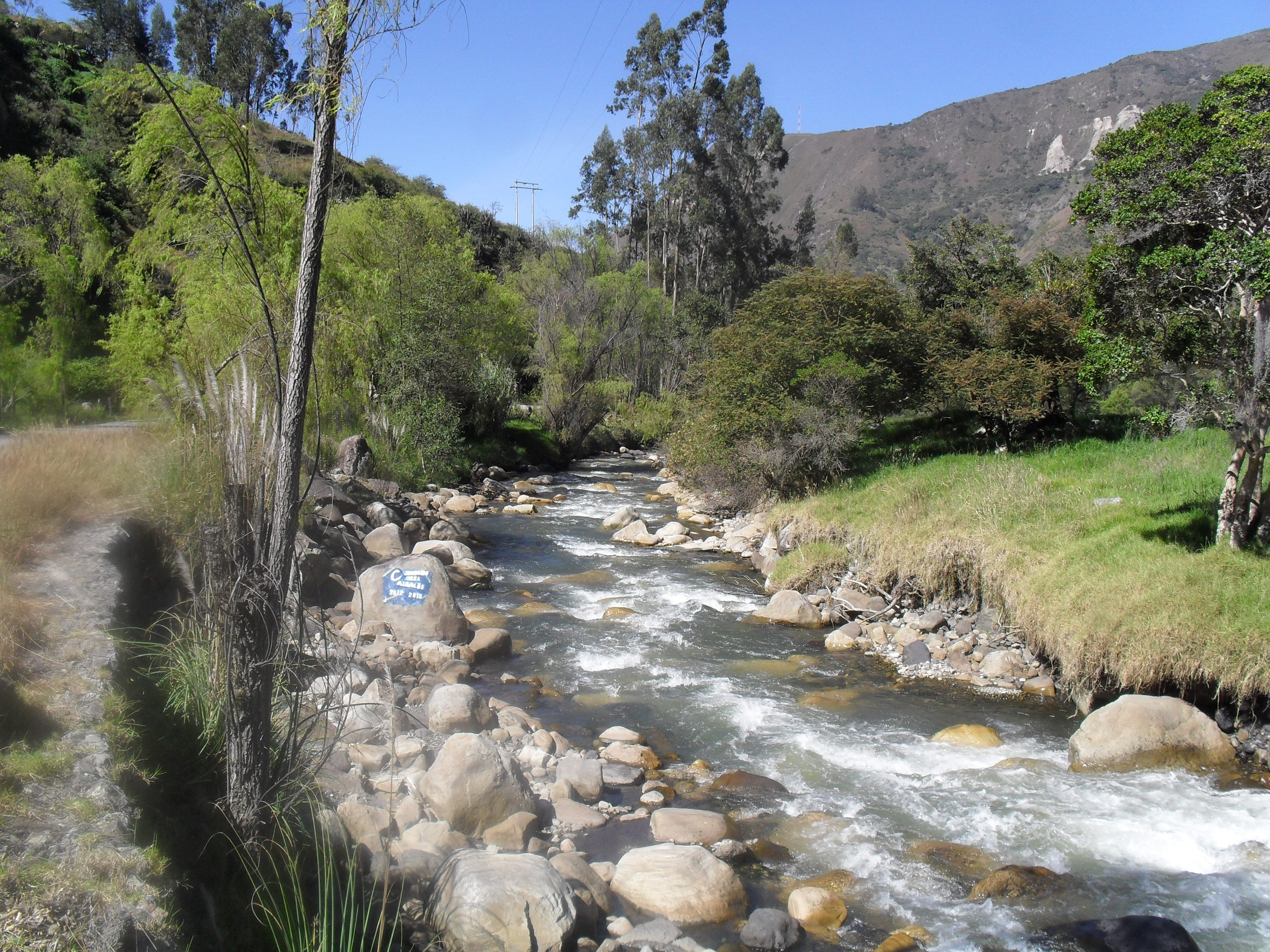 Río Concavo en Guicán, Boyacá, Colombia